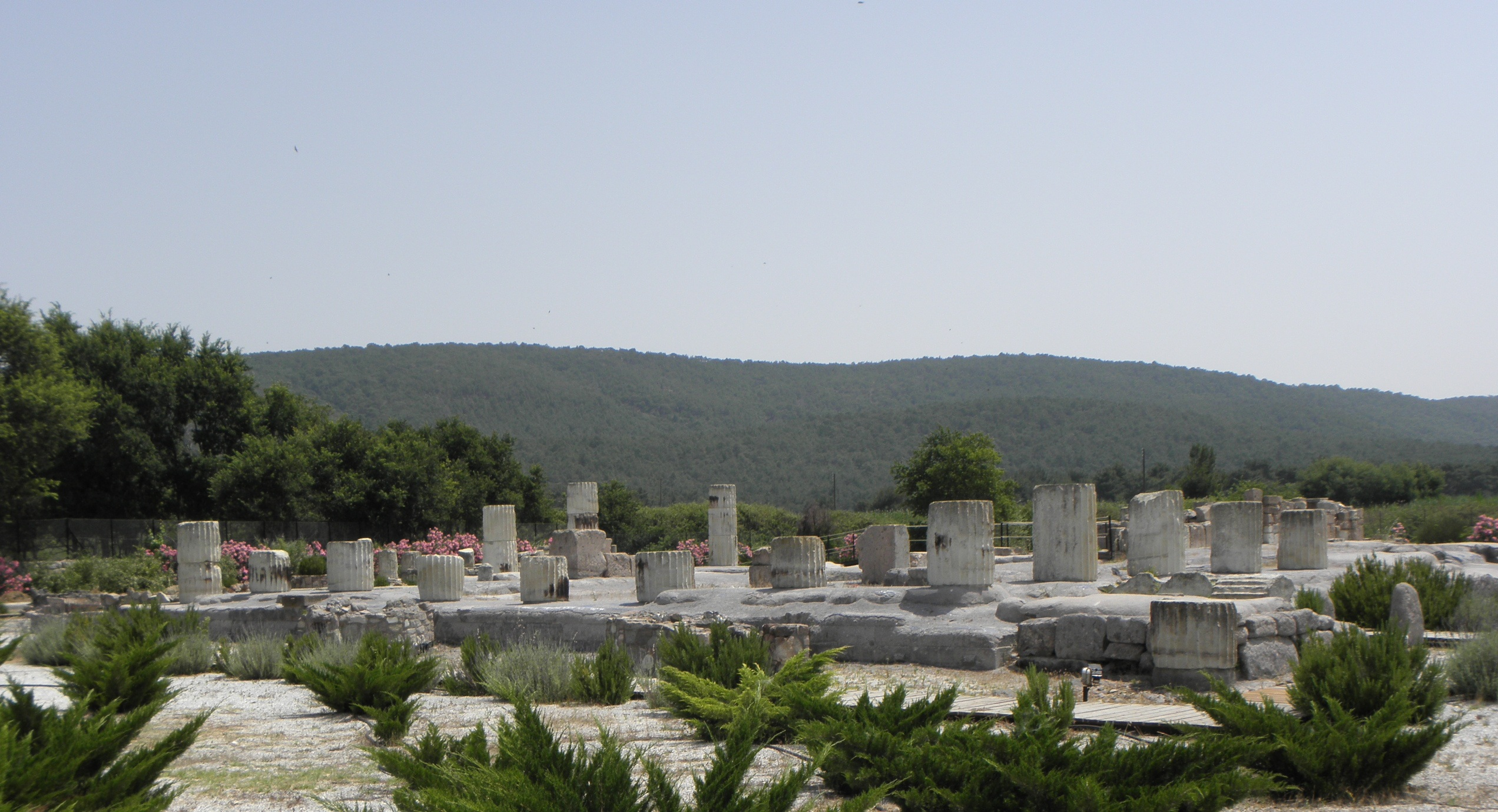 Pozůstatky antického chrámu (pravděpodobně Afroditina) Messa, Lesbos